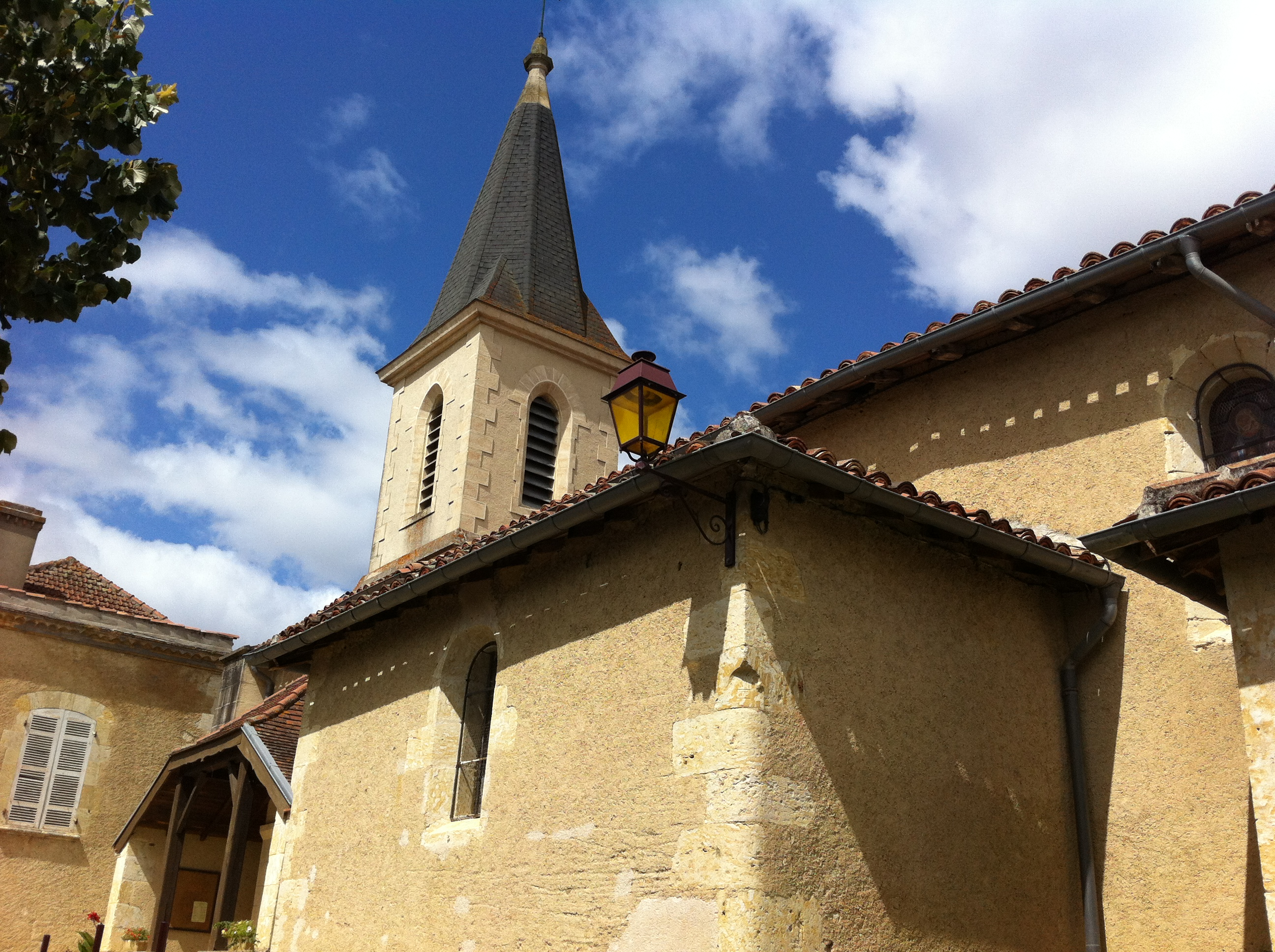 Duran est un village du Gers situé près d'Auch